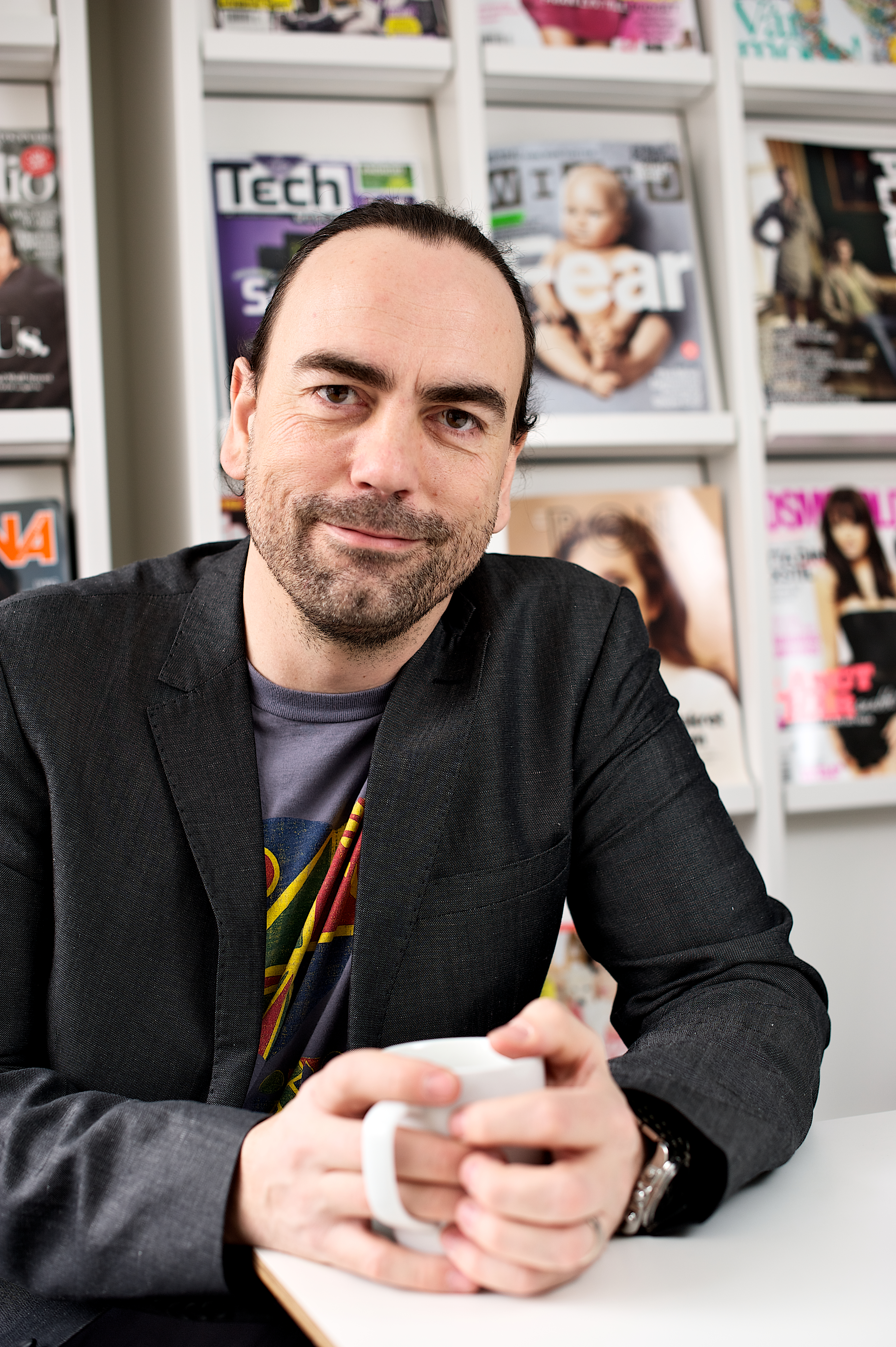 Free to use Byline: Tobias Björkgren Högupplöst printversion/CMYK (92MB) Jardenberg Pressbild Color Print CMYK.tiff